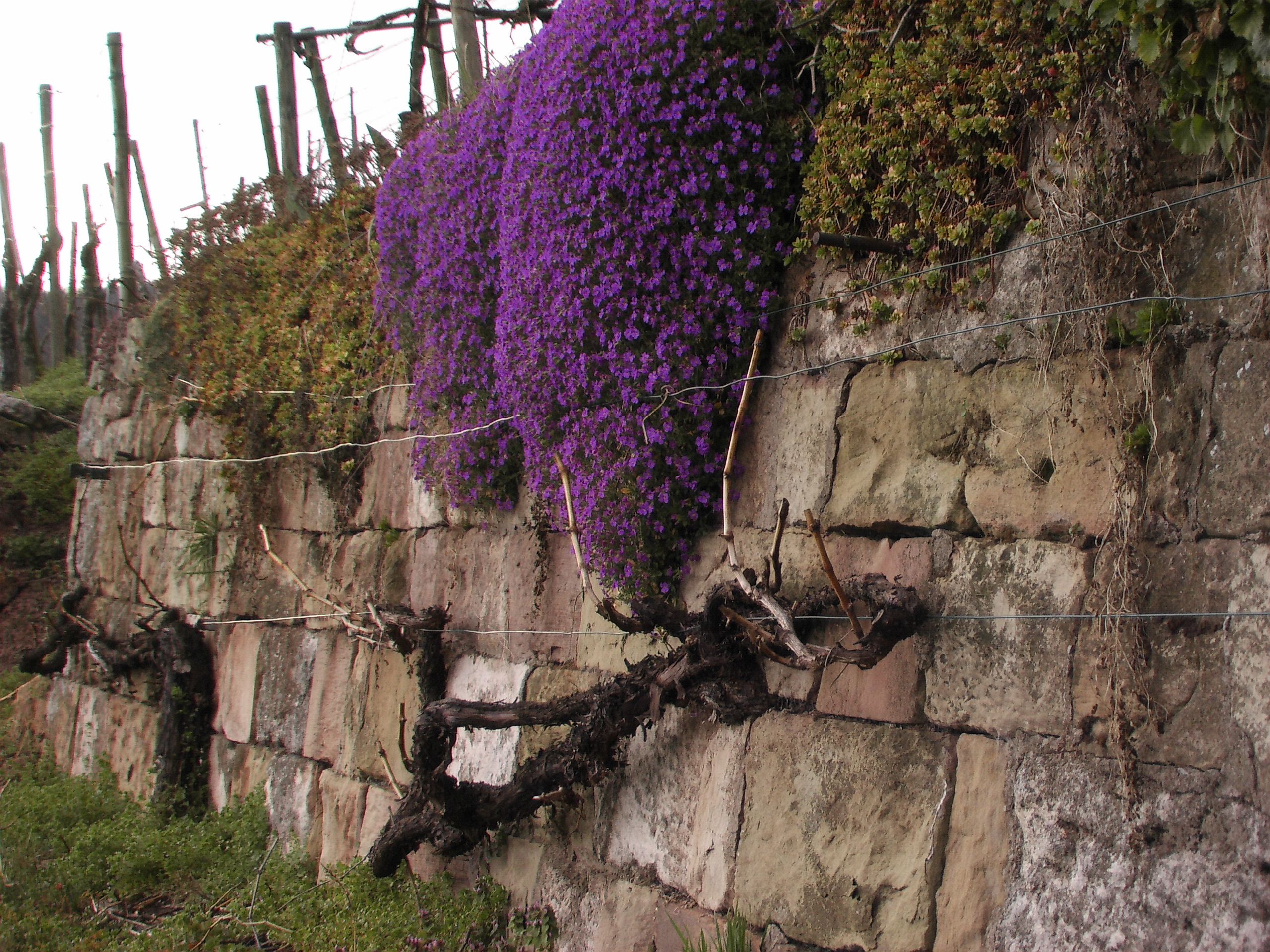 Trockenmauer eines Weinbergs in Süddeutschland mit typischen Bewuchs